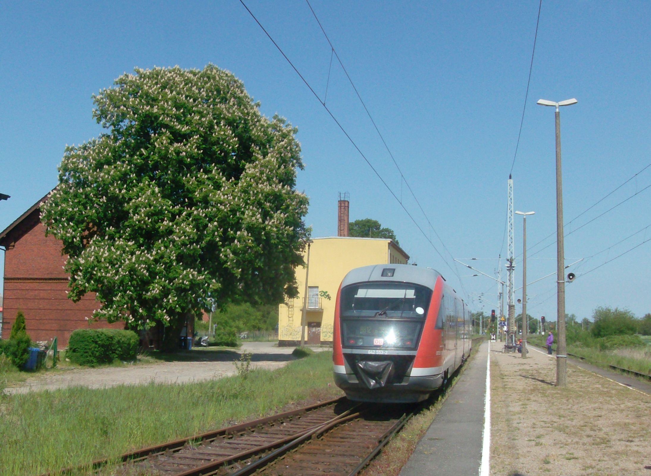 Dieseltriebwagen der Baureihe 642 im Bahnhof Rövershagen.